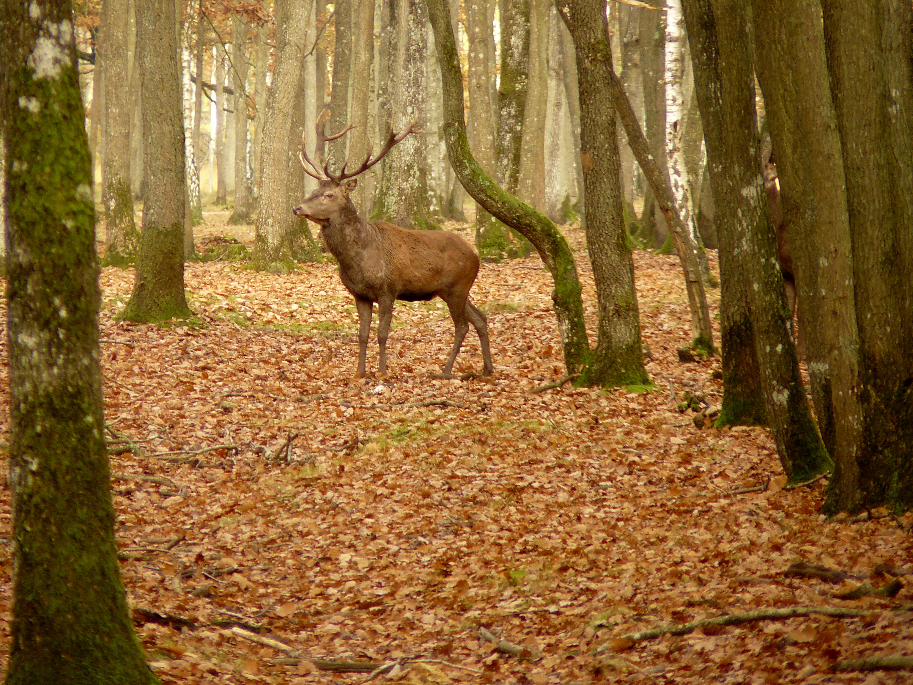 Un cerf à l'Espace Rambouillet (Yvelines, France)